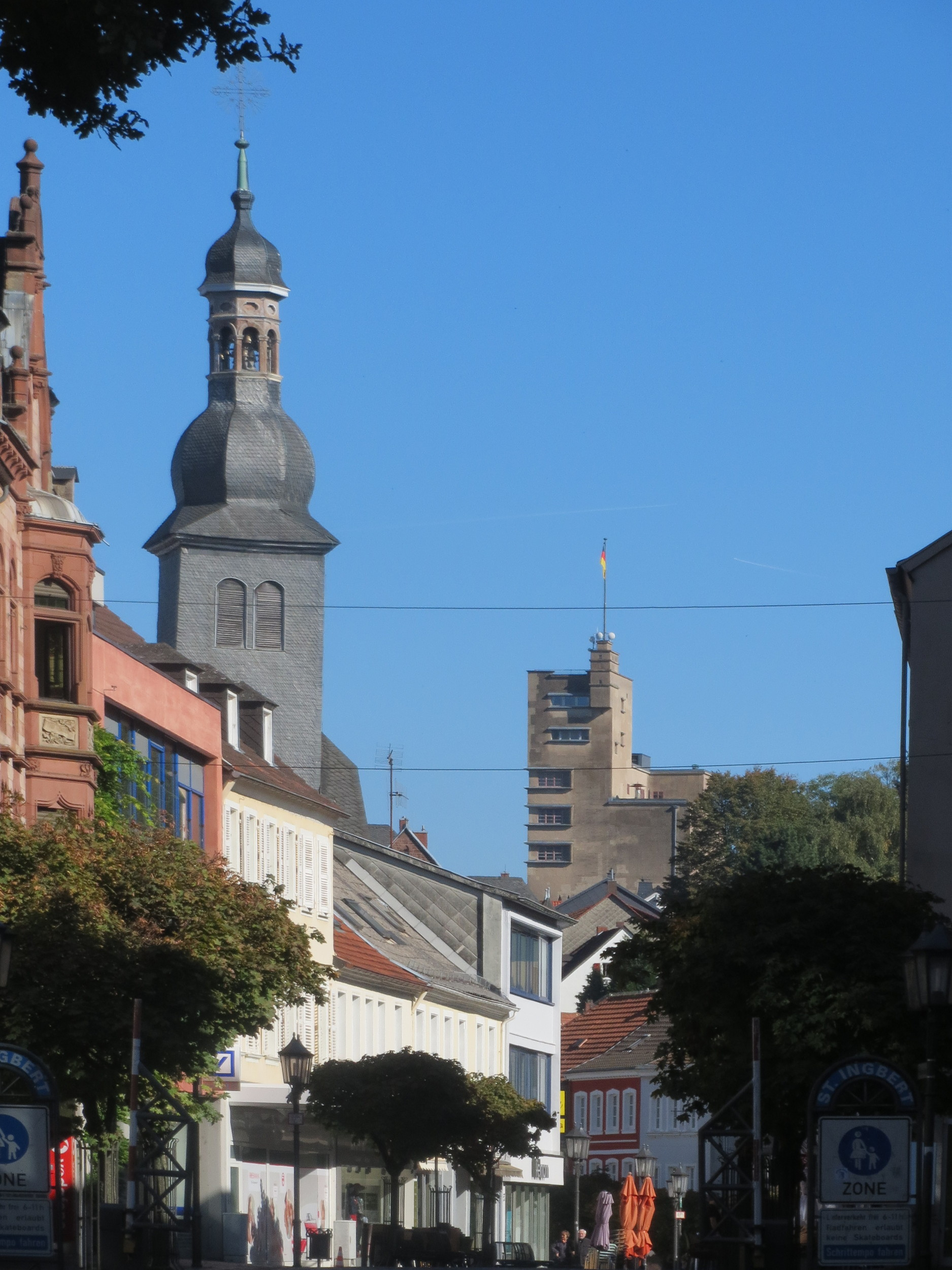 Kaiserstraße in St. Ingbert mit Beckerturm